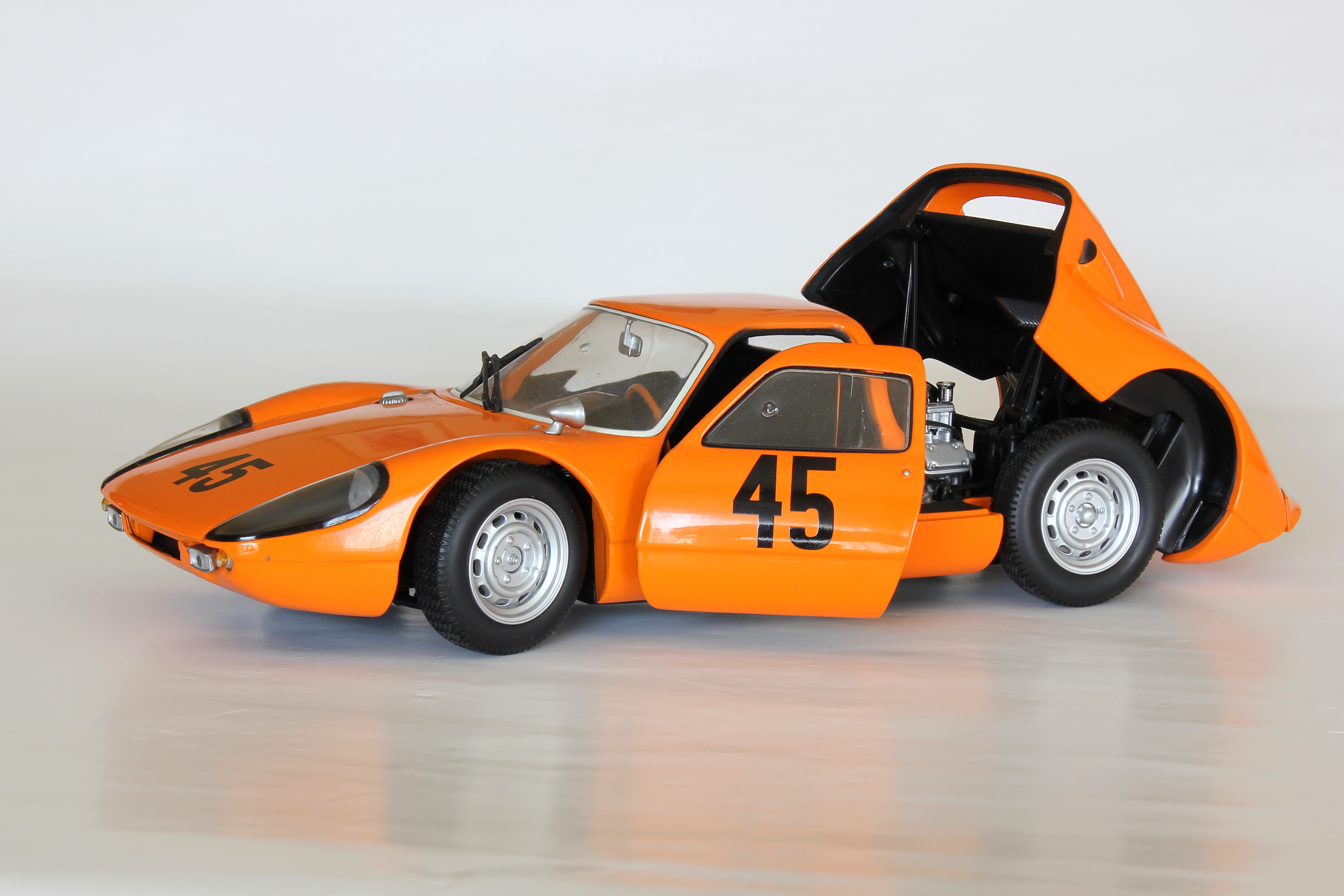 Modell eines Porsche 904 GTS von Minichamps, Maßstab 1 : 18. Mit dem Wagen Nr. 45 wurden Ben Pon/Gerhard Koch Dritte des 1000-km-Rennens 1964 auf dem Nürburgring und Sieger der GT-Klasse bis 2 Liter Hubraum.)